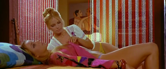 Screenshot del film La liceale (1975).